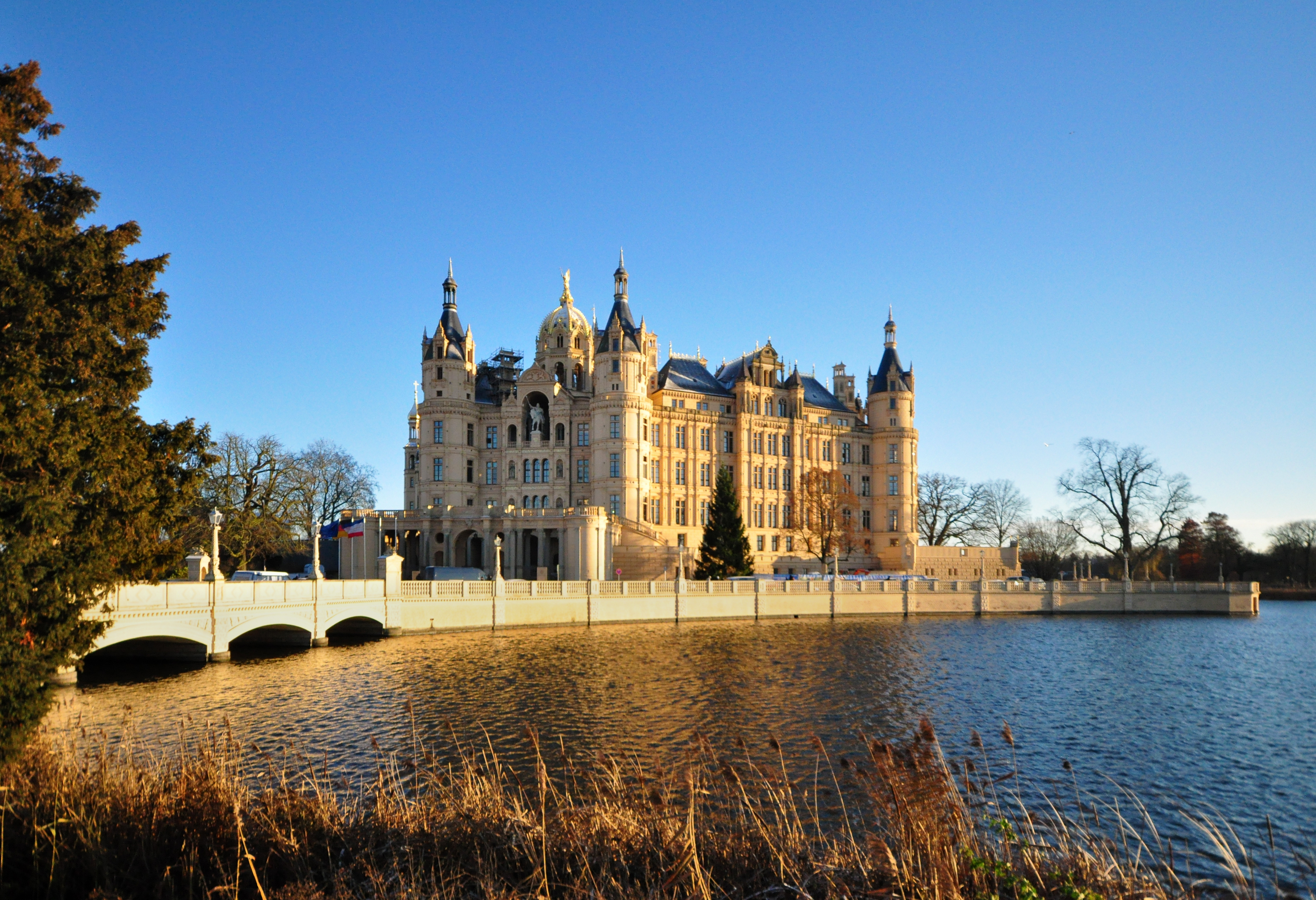 Schweriner Schloss mit Burgbrücke und Burgsee